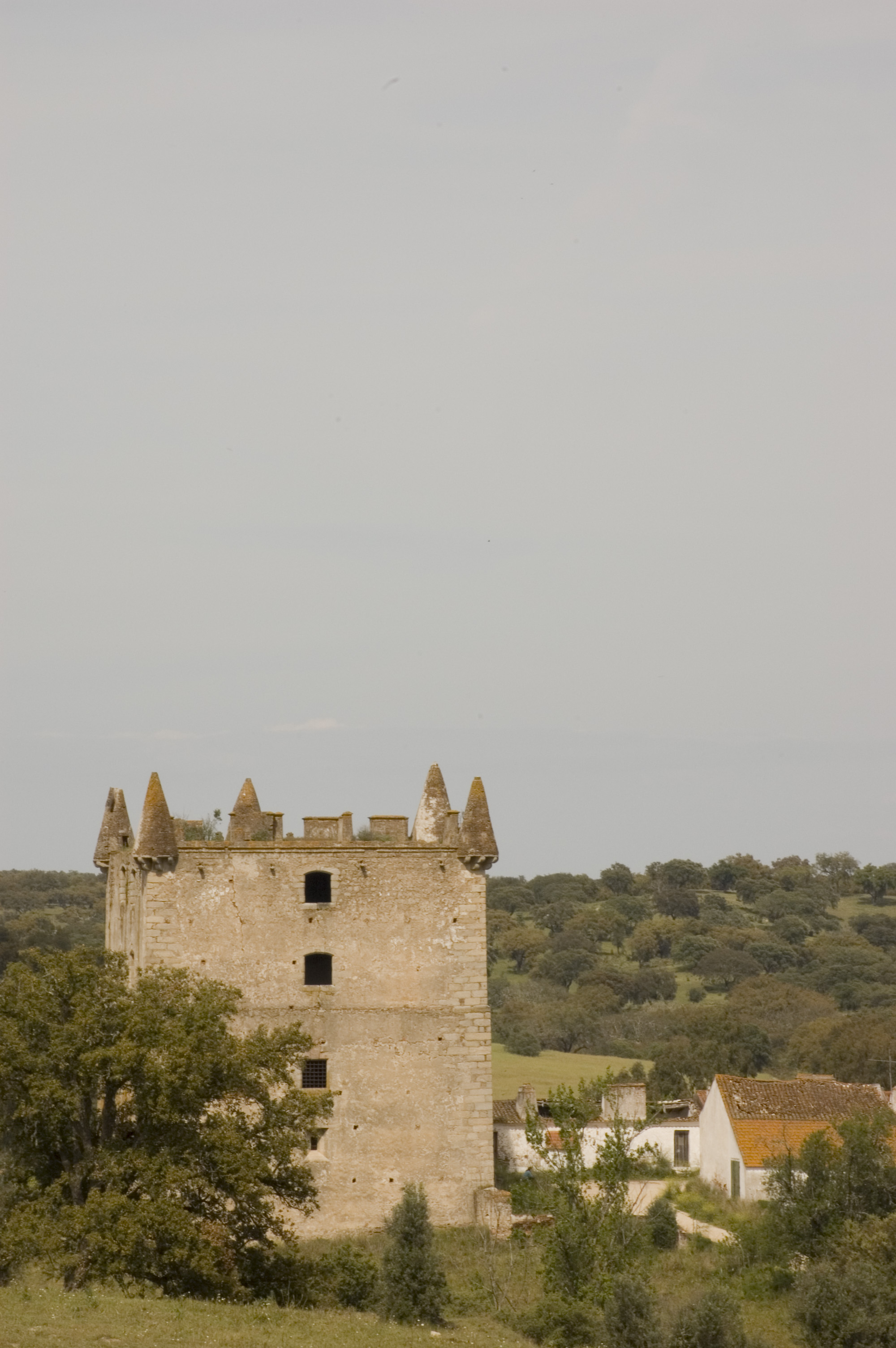 Torre das Aguias